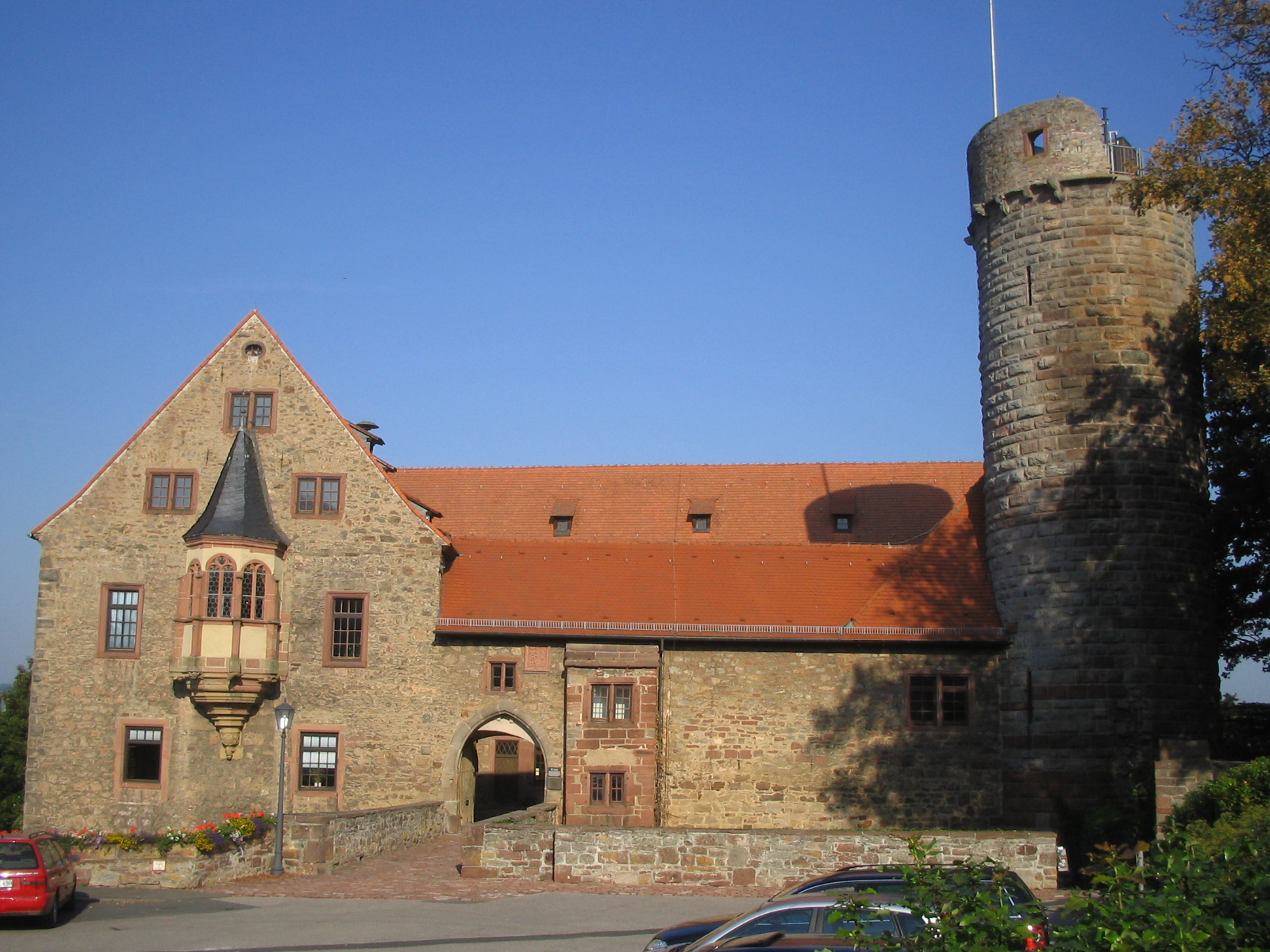 Schloss Külsheim